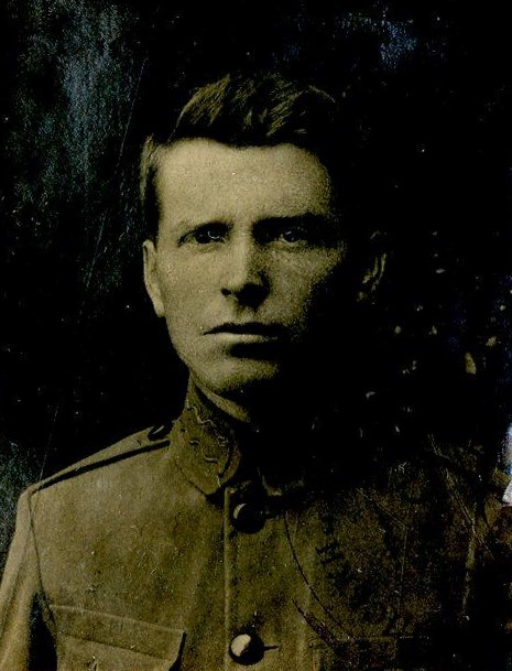 Миха́йло Фе́дорович Бри́нський (11 жовтня 1883, с. Долина, нині Тлумацького району — 10 січня 1957, Прага, Чехословаччина) — український скульптор, академік скульптури Празької академії образотворчих мистецтв, четар УГА.